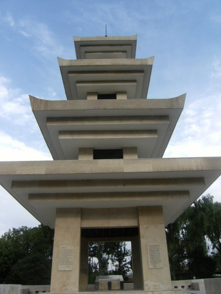 Korede Savaşan Türkler Anıtı